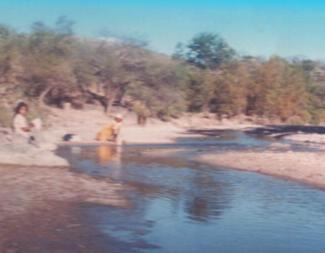 Dos mujeres mixtecas lavan ropa en el río Acatlán, en la Mixteca Baja Poblana (México)